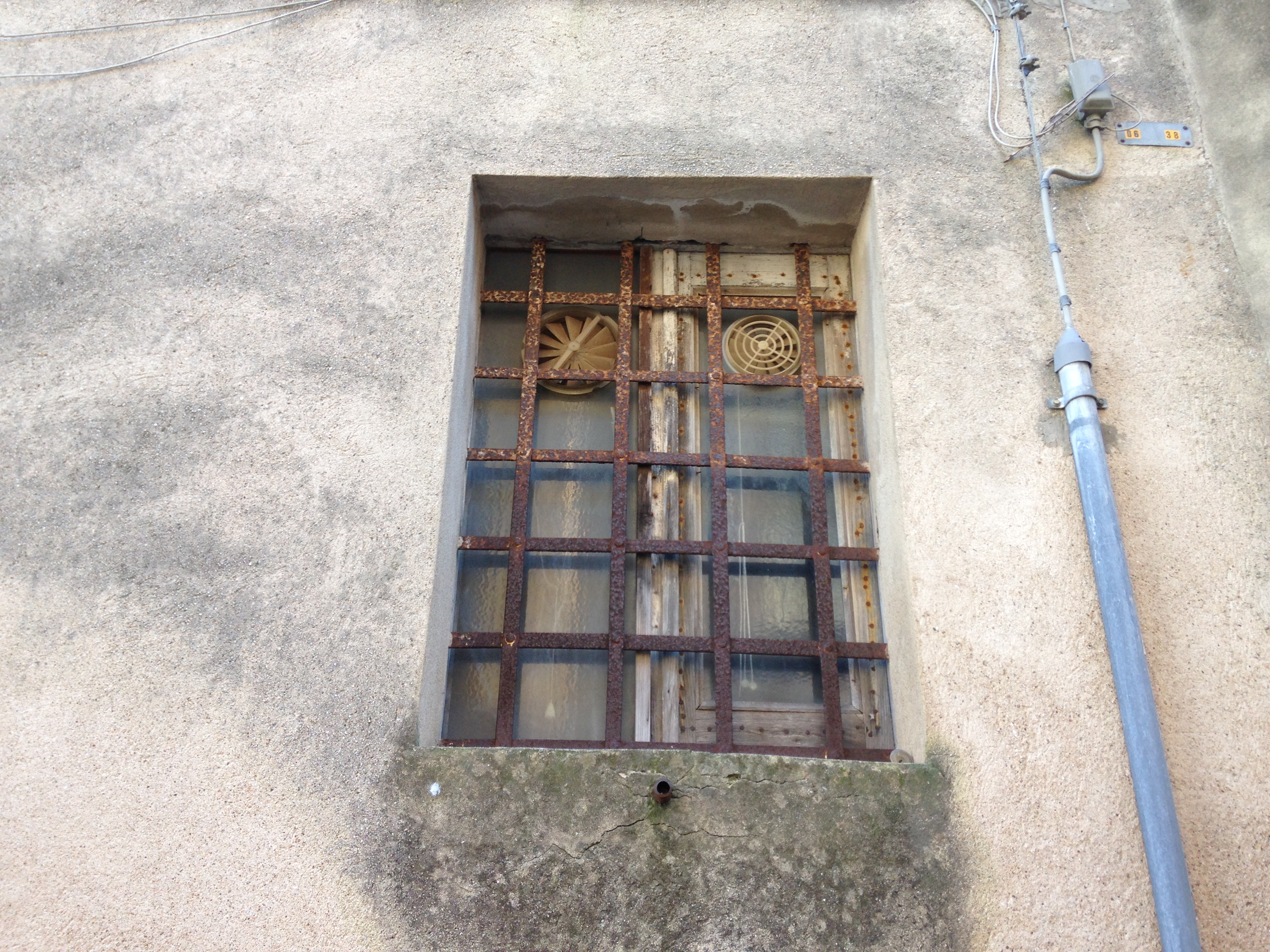 Due aeratori eolici per vetri installati su una finestra.